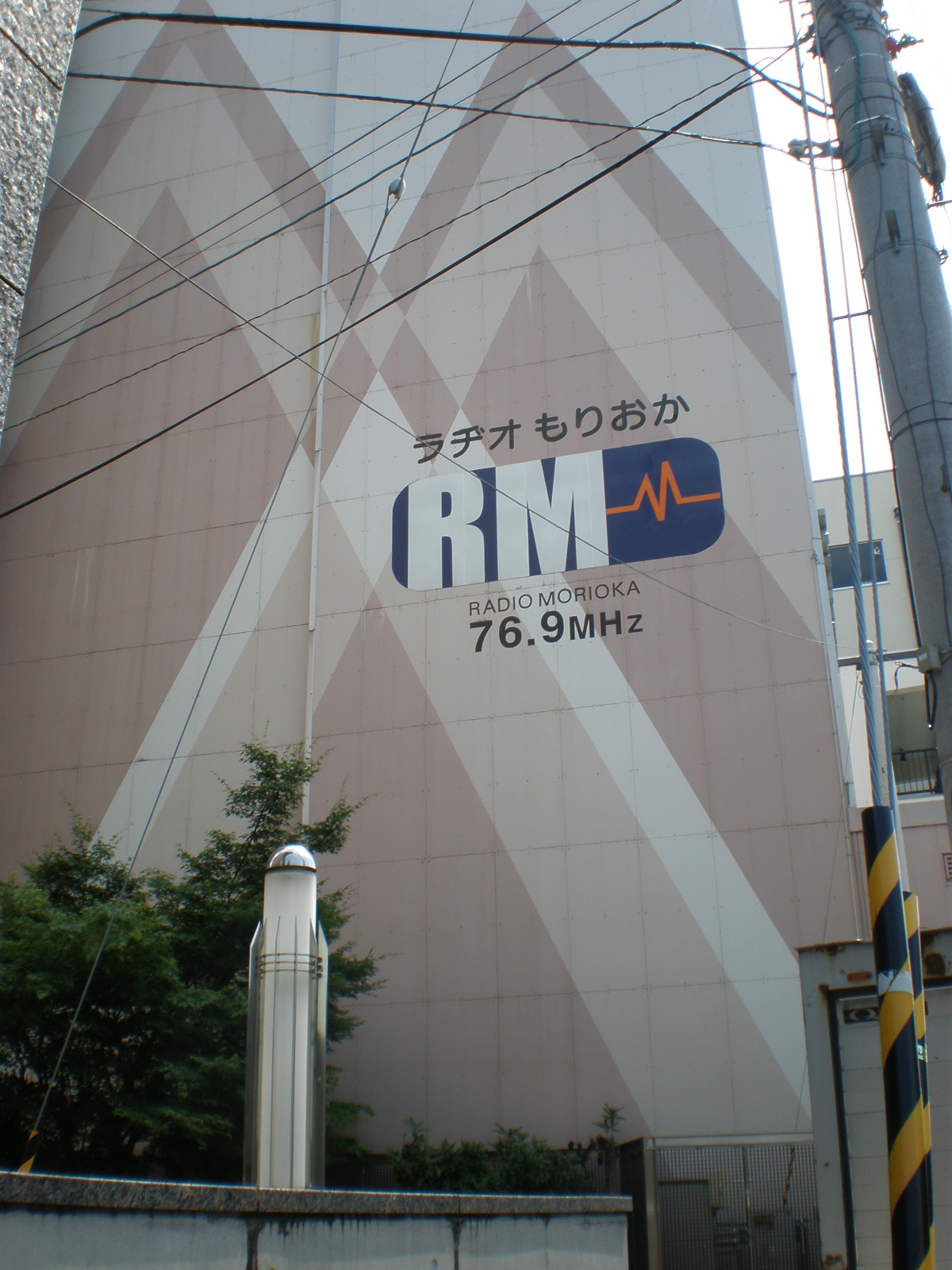 ラヂオもりおか本社入居ビル